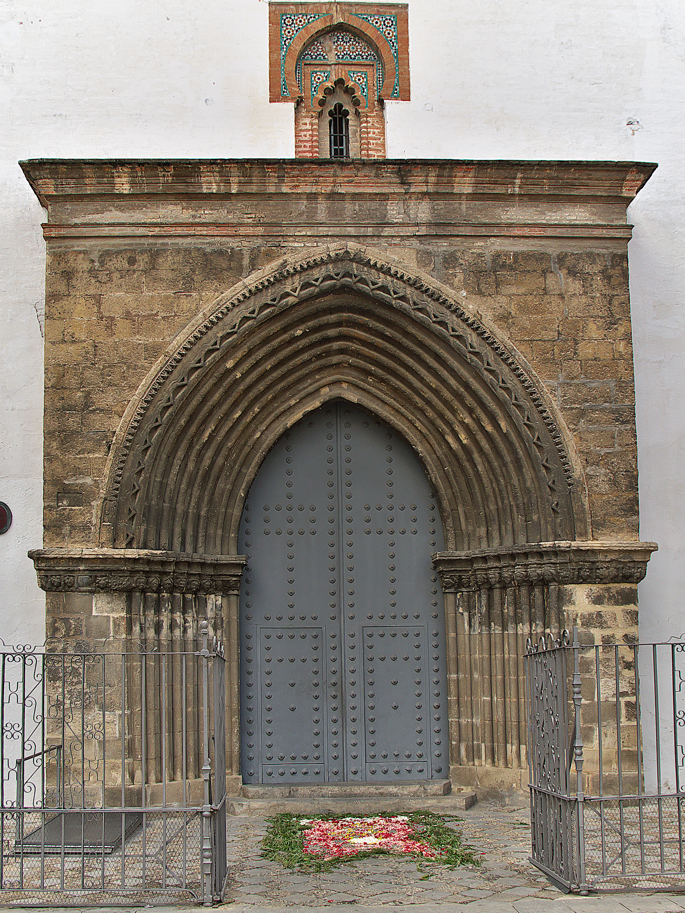 Iglesia de Omnium Sanctorum (Sevilla). Portada principal de la iglesia. Cantería del Cerro de San Cristóbal; jambas degradadas, interesantes; dientes de sierra y ventana en ladrillo aplantillado.